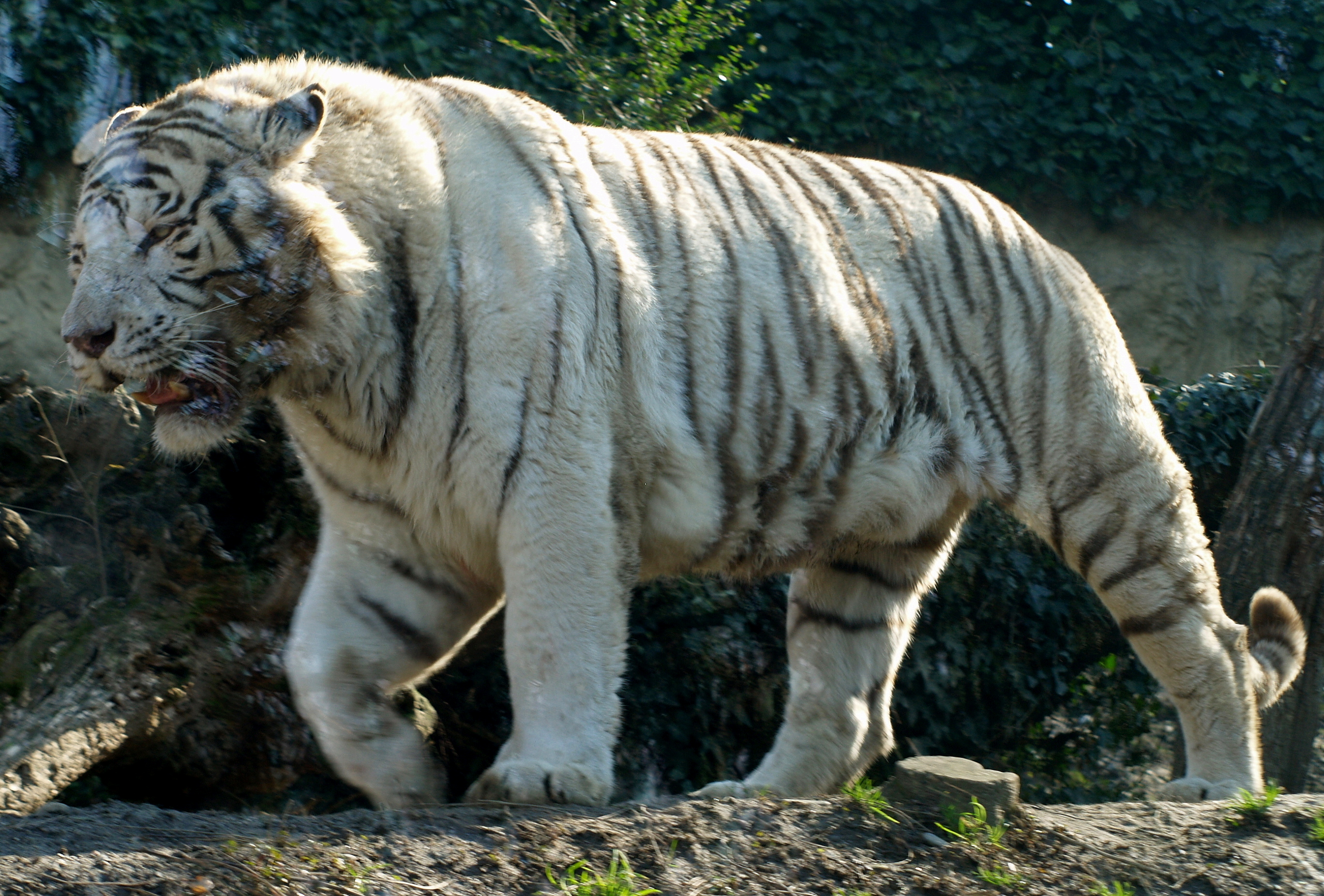 Parco Faunistico Le Cornelle (TIGRE BIANCA)